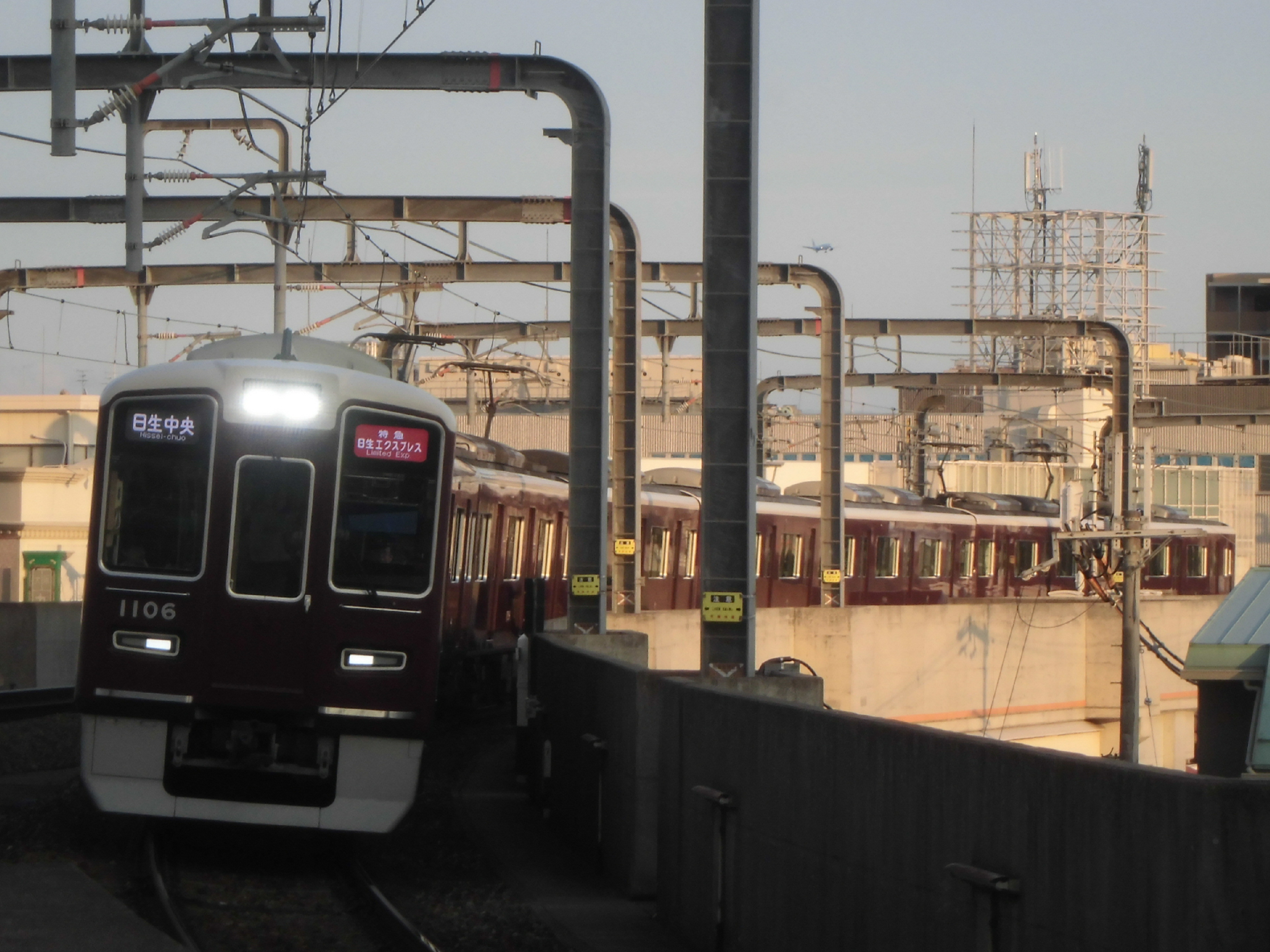 阪急1000系1006F